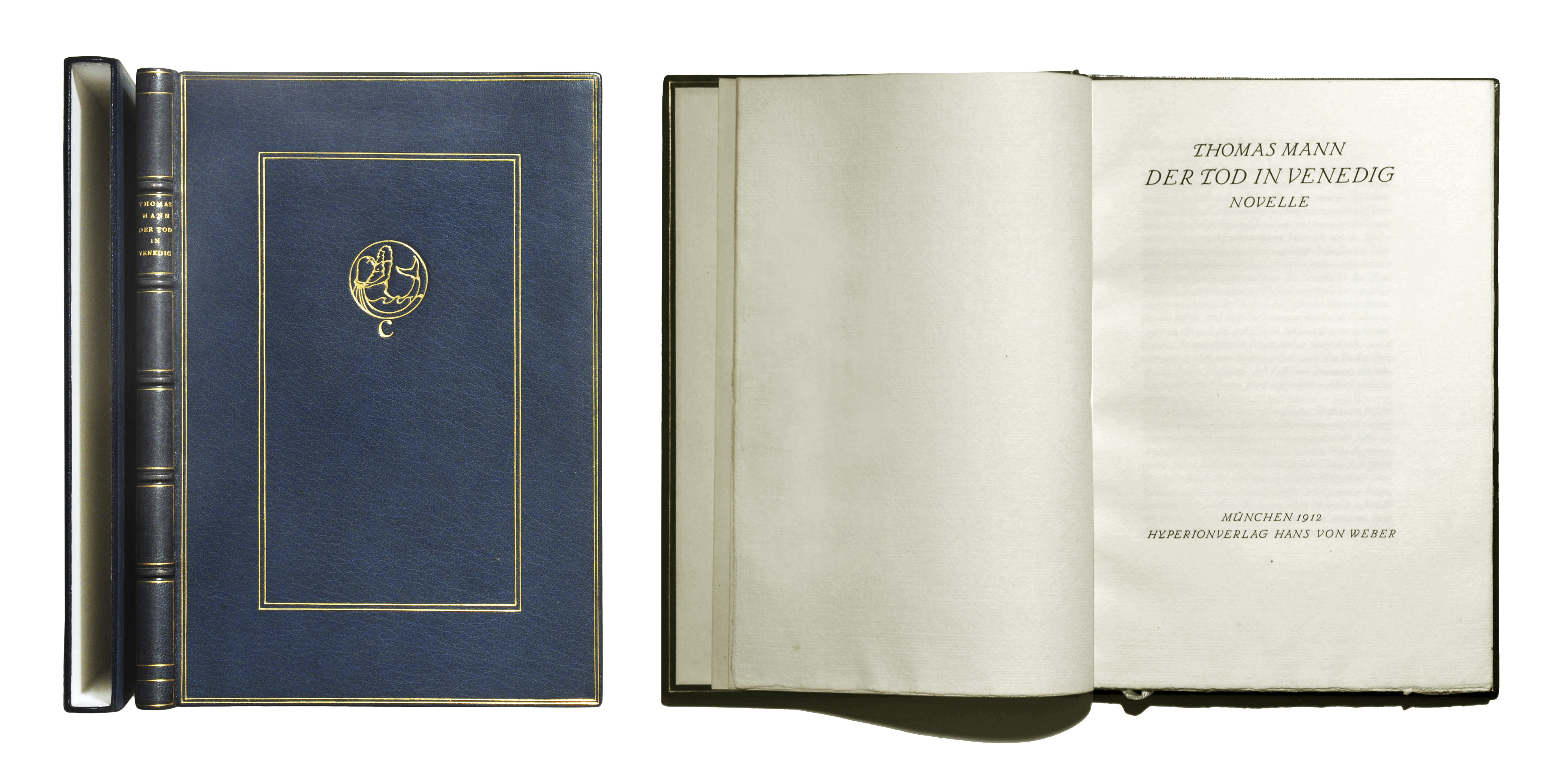 Thomas Mann: München: Hyperion-Verlag Hans von Weber 1912, 99 Seiten; Erstveröffentlichung in einer Auflage von 100 Exemplaren (dreizehnter Hundertdruck des Hyperion-Verlages), Exemplar LXXI (Potempa E 26.1, Bürgin I 8, Haack * S. 49). Kleines Exlibris der Sammlerin Lucy Spiegel auf vorderem Spiegel. Gesetzt in der hier erstmals verwendeten Tiemann-Kursiv, gedruckt bei Poeschel & Trepte in Leipzig. Geripptes Bütten mit Hundert-Wasserzeichen. Goldener Kopfschnitt, sonst unbeschnitten. Dunkelblaues Maroquin, Lexikon-Oktav auf Bünden. Goldgeprägter Rückentitel. Zwischen den Bünden goldgeprägte Rechtecke. Buchdeckel mit rechteckig umlaufenden Goldfileten (vorn vierfach, hinten zweifach, auf den Einschlägen einfach). Vorderdeckel mit goldgeprägter Hundertdruck-Vignette des Hyperion-Verlags. Schmuckschuber (Kanten gefasst im Leder des Einbands) und Leseband, gefertigt von E. Ludwig Frankfurt am Main (goldener Prägestempel auf unterem Einschlag des Vorderdeckels). Es existiert eine gleichartige Einbandgestaltung von Carl Sonntag jun. Leipzig. Die Prägestempel unterscheiden sich minimal.